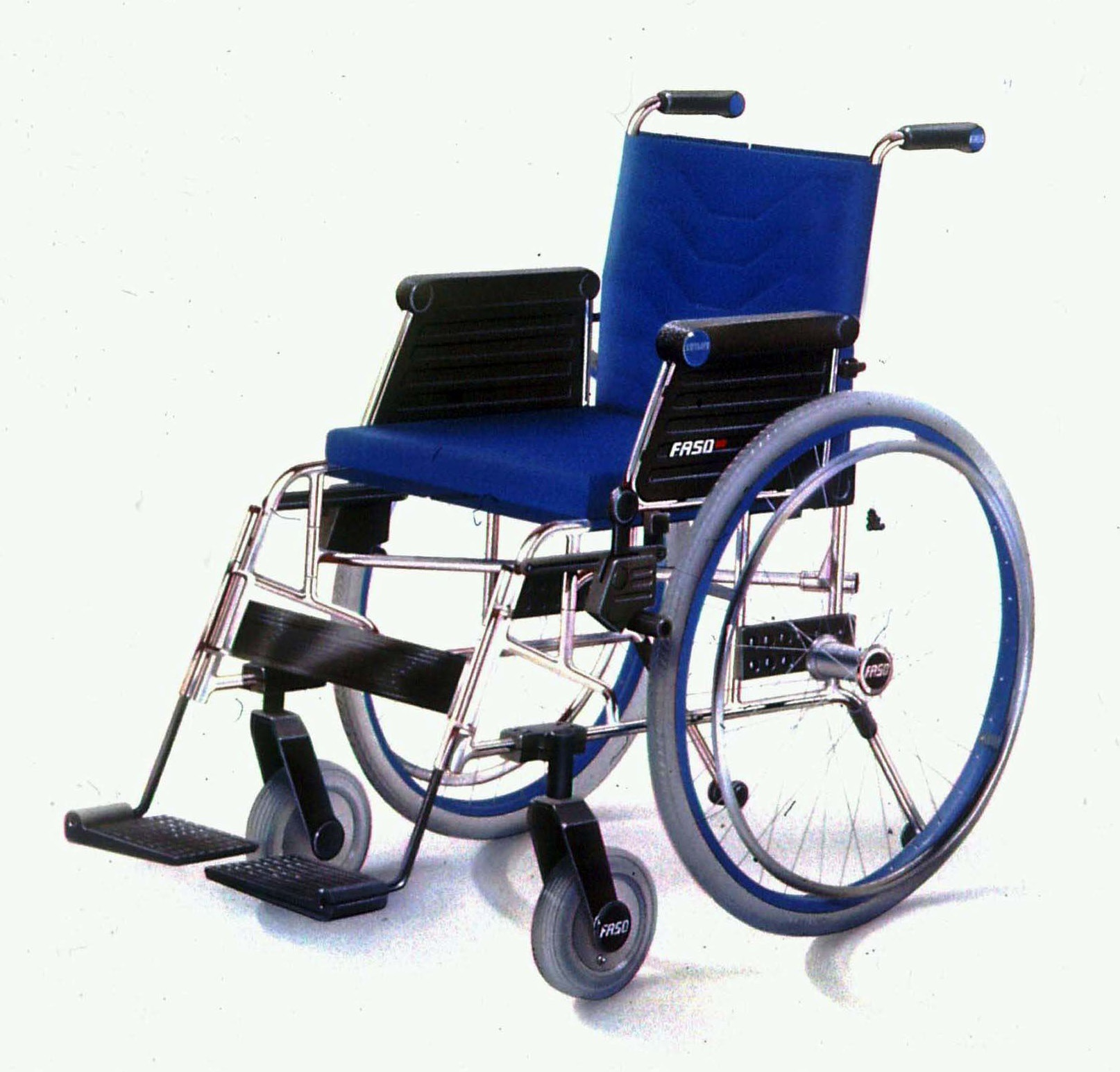 Wózek inwalidzki FASO Active produkowany przez Warszawskie Zakłady Sprzętu Ortopedycznego